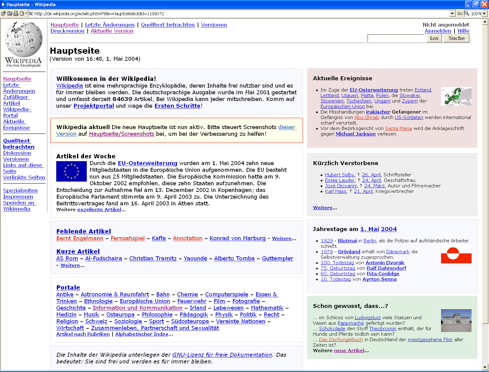 Screenshot der Wikipedia-Hauptseite vom 1.5.2004 mit Opera 7.23 und Windows-Skin unter Windows XP